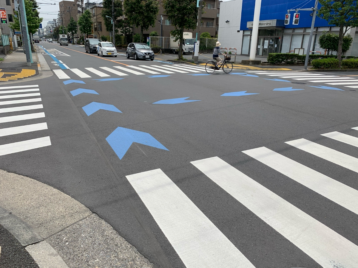 普通自転車専用通行帯の交差点における整備例。矢羽根マークで自転車を誘導している。